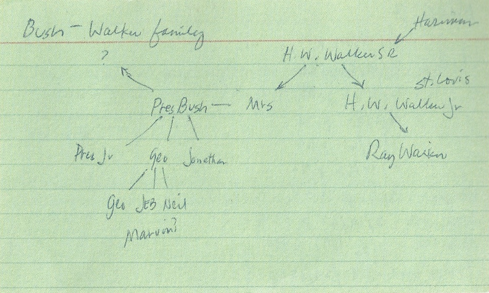 Bush Jr. ficha-Lombardi